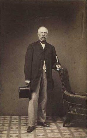 Carl Eggert Georg Løvenskiold (1806-1884), Danish baron and civil servant